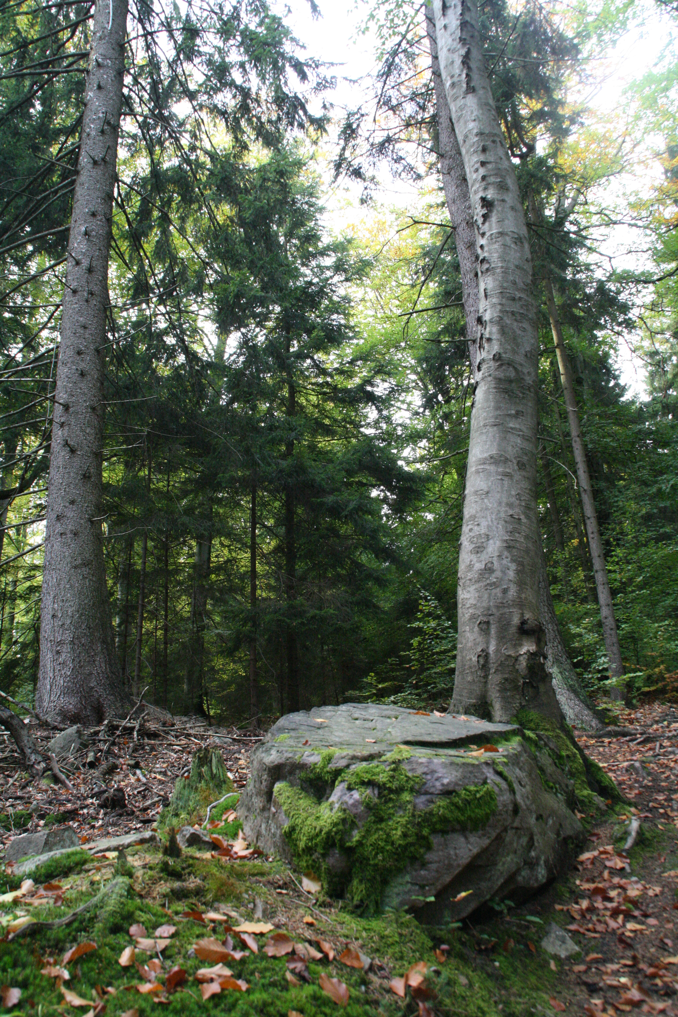 Již vytvořený smíšený porost,díky výchovným zásahům